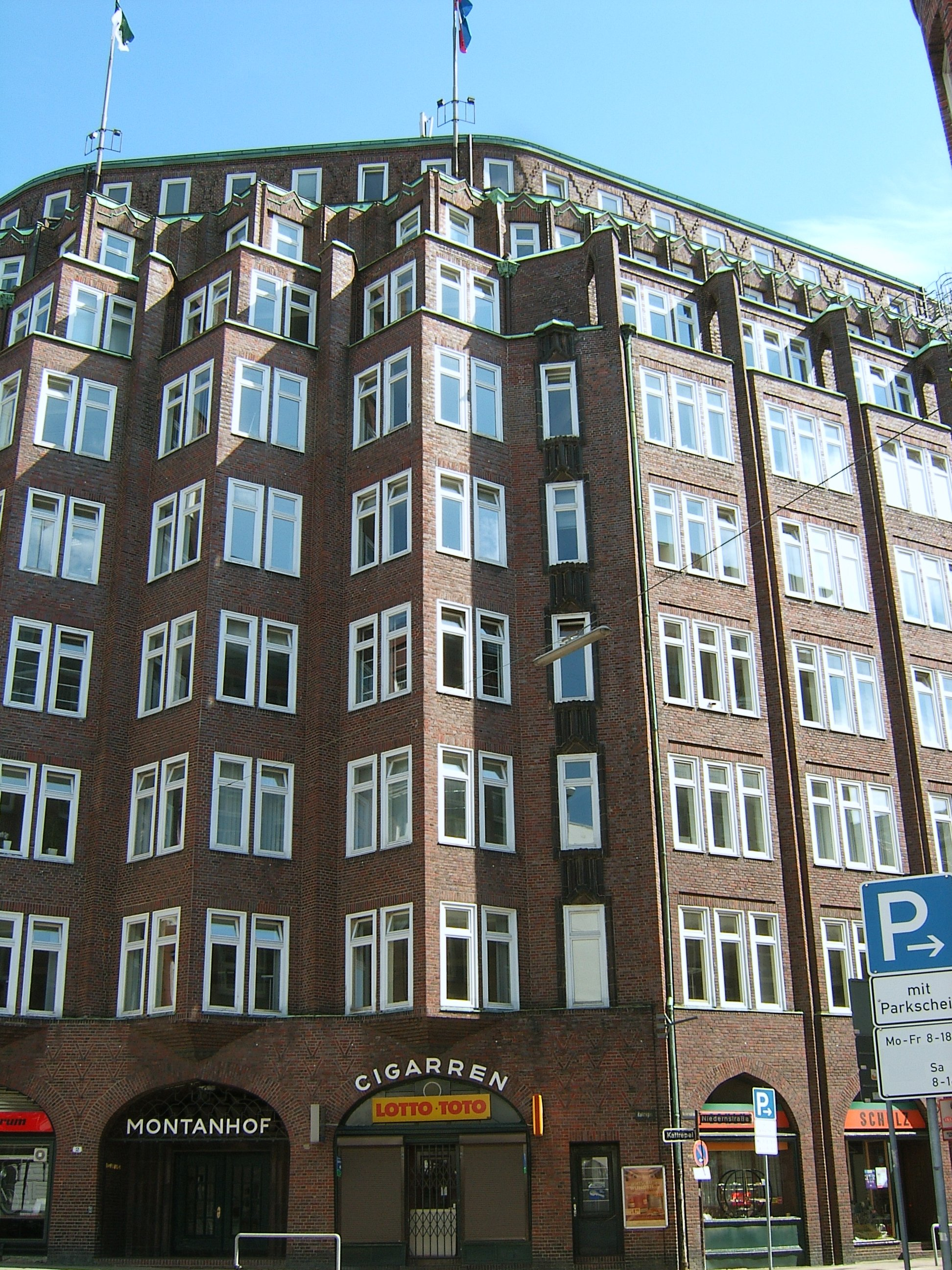 Der Montanhof am Kattrepel in Hamburg-Altstadt wurde 1924 bis 1926 nach Entwürfen von Distel & Grubitz erbaut. This is a photograph of an architectural monument.